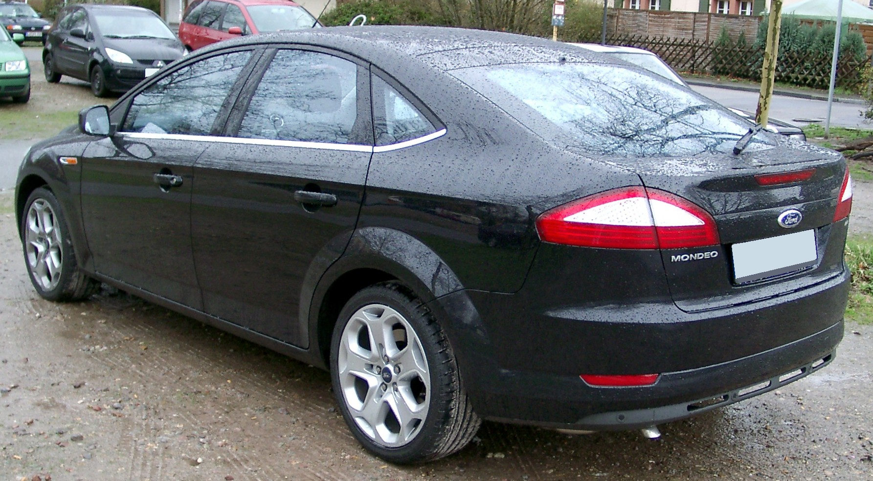 Ford Mondeo, 3. Generation